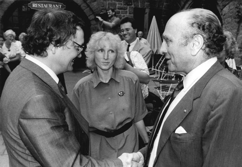 ADN- Ralf Hirschberger-27.7.90-Bez. Erfurt: Bergfest- VK-Vizepräsident Dr. Jürgen Schmieder (l) begrüßt den Vorsitzenden der FDP (West), Dr. Otto Graf Lambsdorff, zu einem Bergfest zwischen VK-Wahl und gesamtdeutscher Bundestagswahl, zu dem sich die Liberalen beider deutscher Staaten auf der Wartburg trafen.